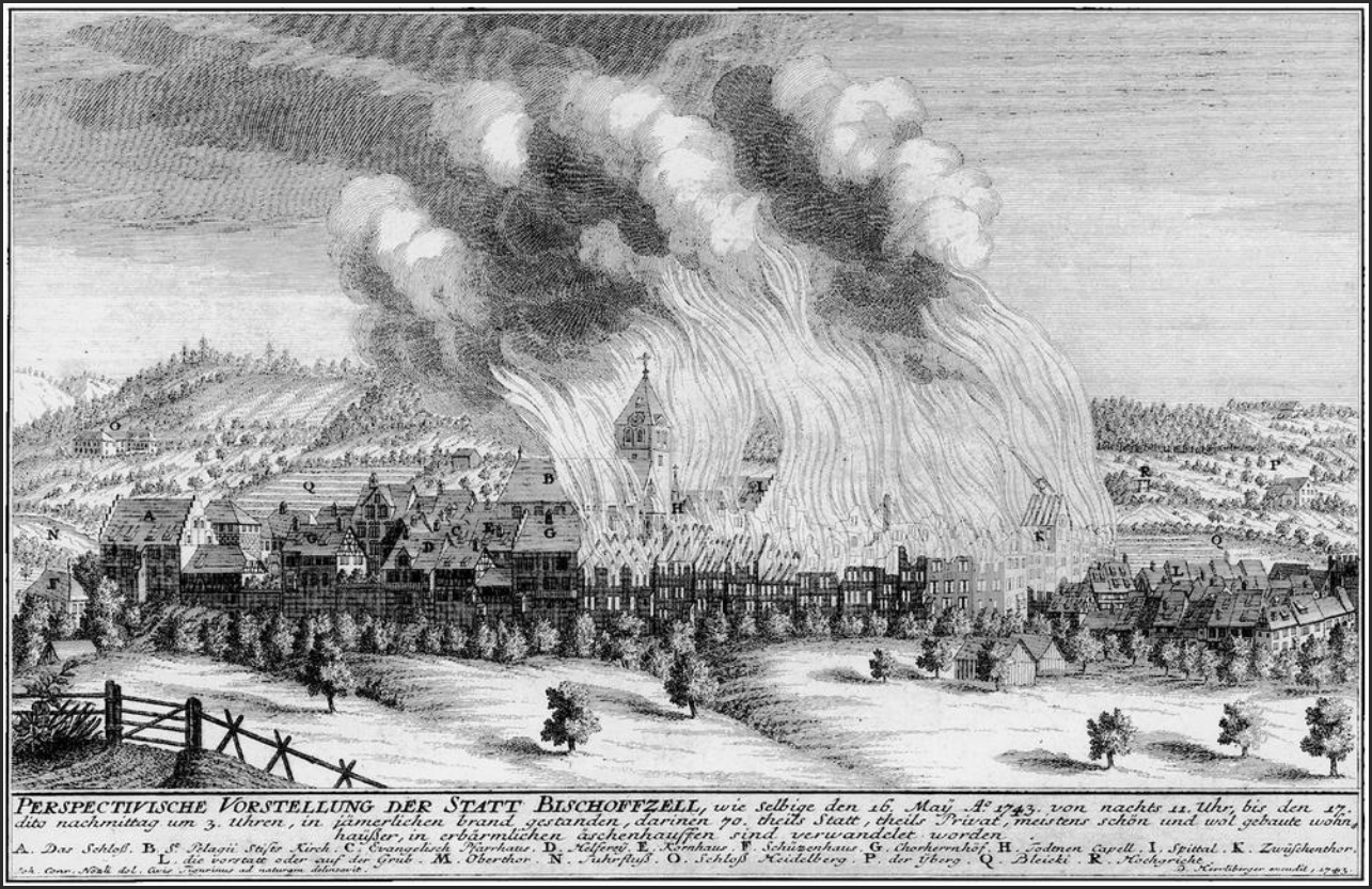 Der Bischofszeller Stadtbrand vom 17. Mai 1743. Radierung von David Herrliberger (Zentralbibliothek Zürich)Der vom Verlagshaus Herrliberger in Zürich veröffentlichte Stich dokumentiert die Katastrophe. Er ist laut einer Ankündigung in den Donnstags-Nachrichten vom 20. Juni 1743 knapp einen Monat nach den Ereignissen erschienen.